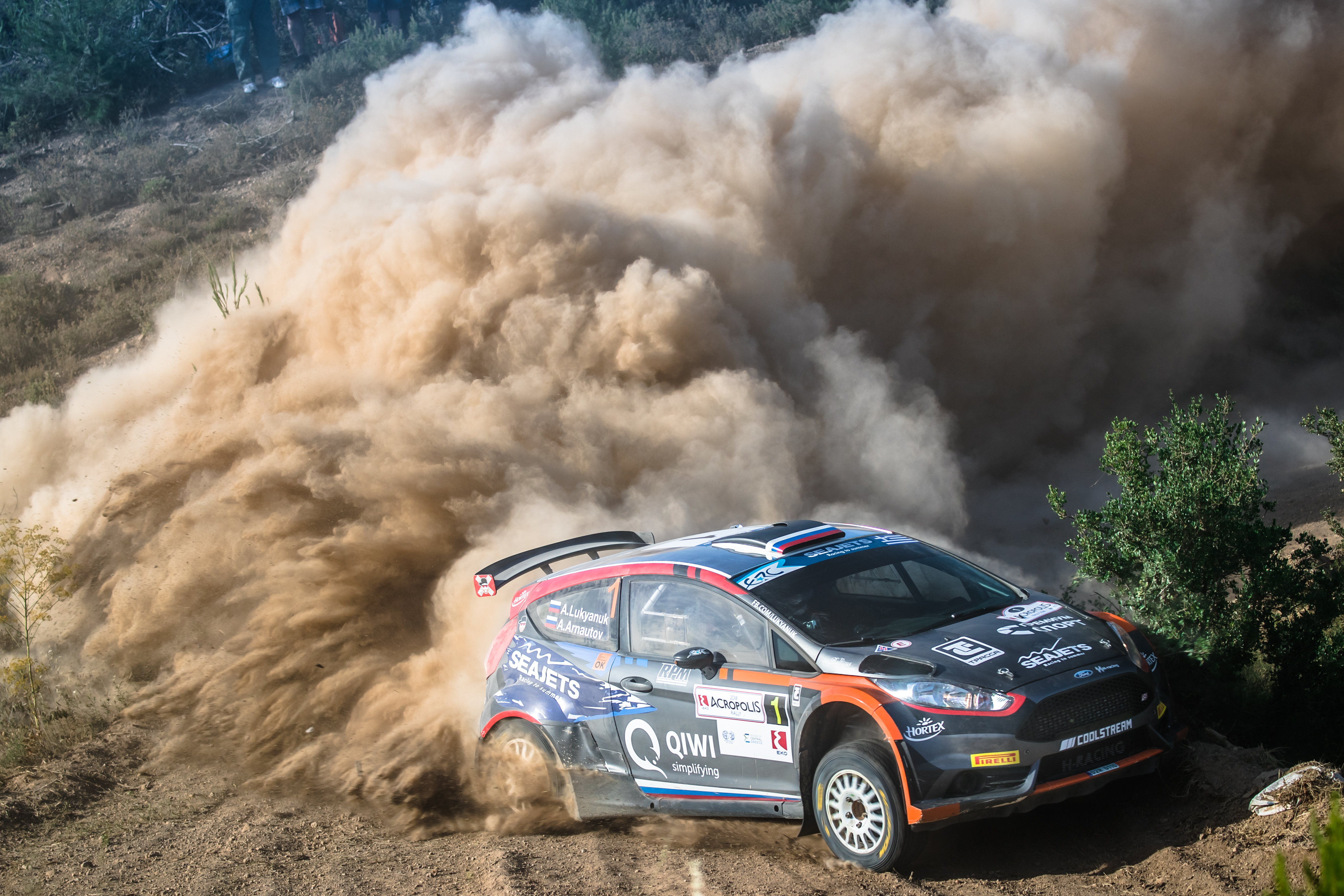 Alexey Lukyanuk on Ford Fiesta R5 on rally Acropolis 2018